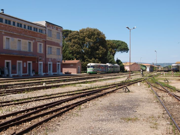 Bahnhof Mandas. Der mittägliche Schülerzug aus Isili ist soeben eingefahren.